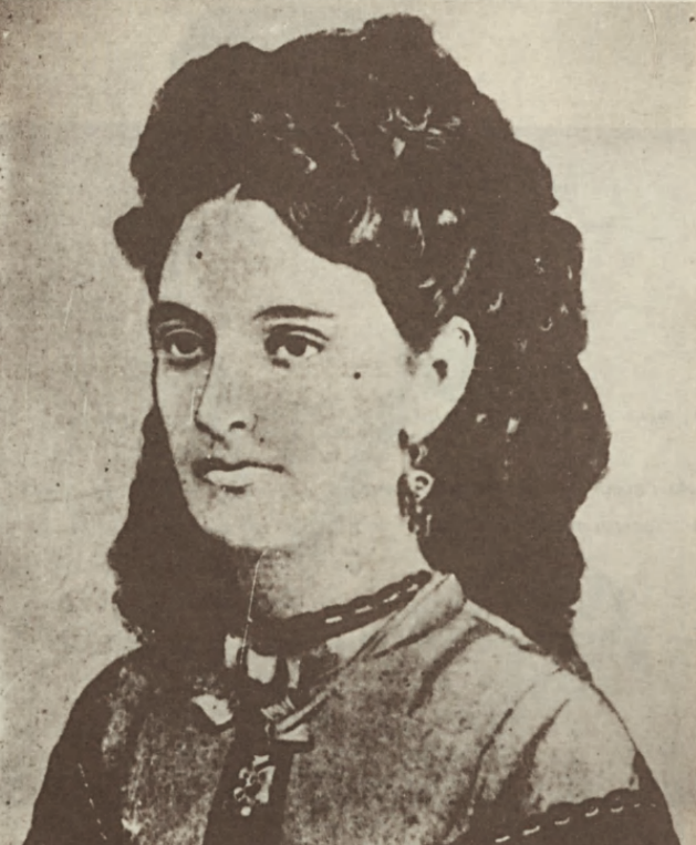 A judia Ester Amzalack, musa do poeta brasileiro Castro Alves, assim como sua irmã Simmy, inspiraram versos apaixonados pelo escritor.